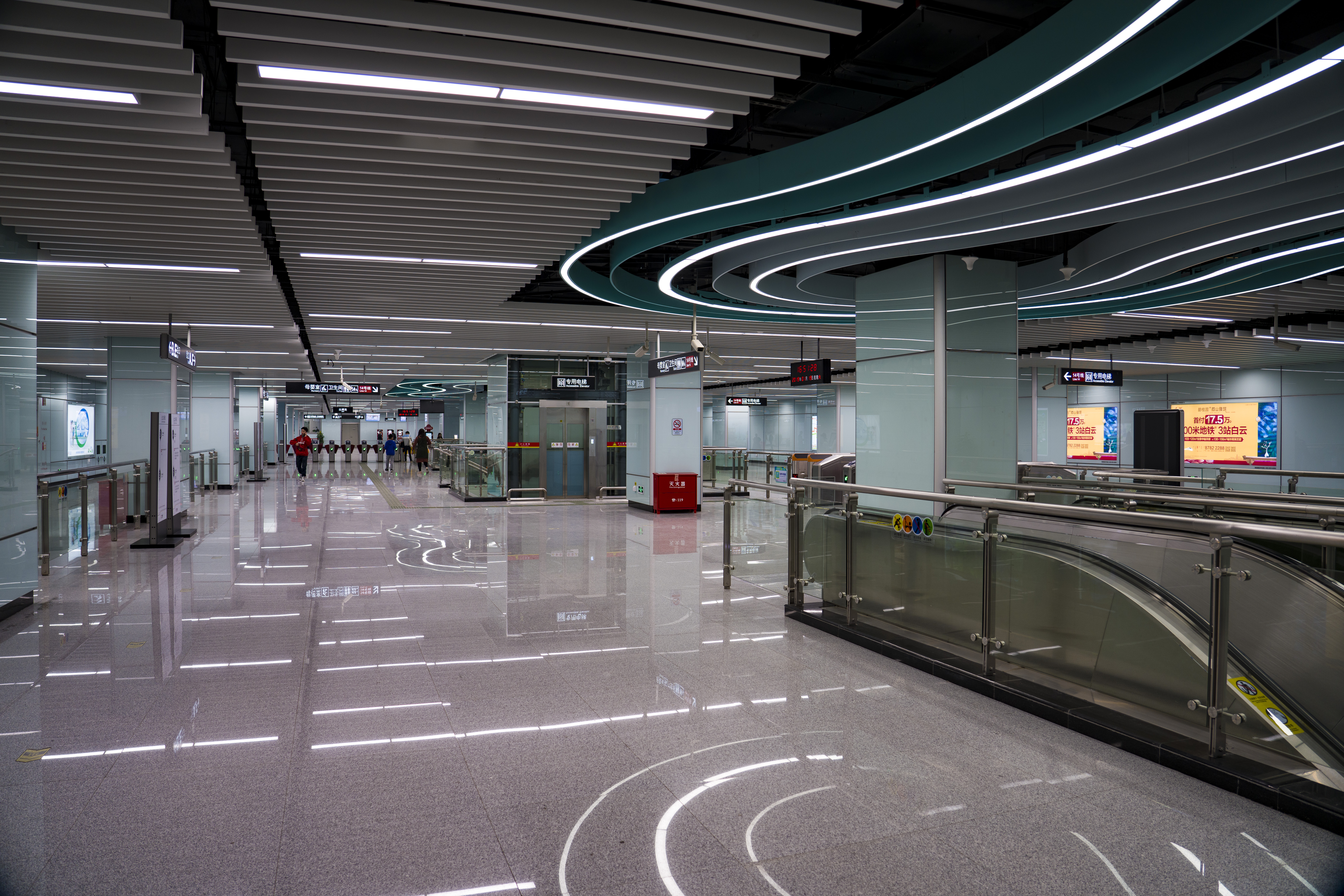 白云东平站站厅